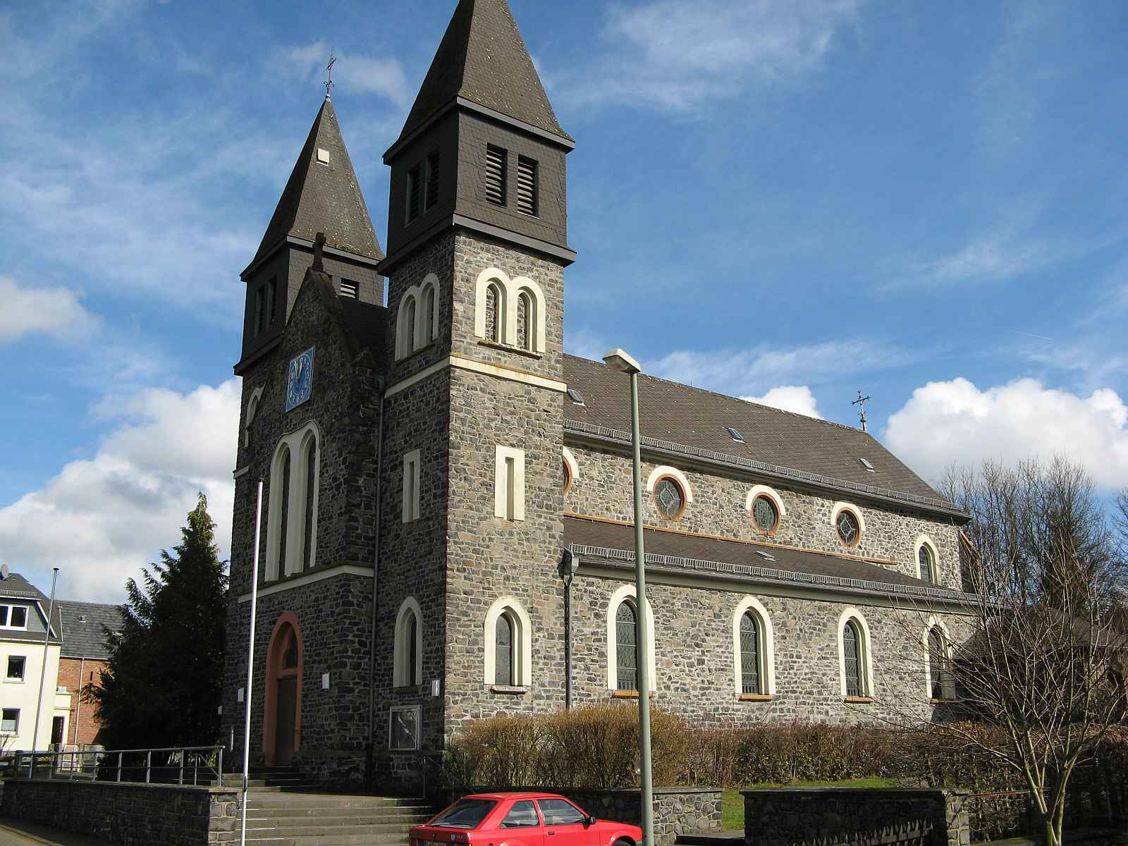 Kath. Pfarrkirche St. Laurentius in Hausen, Waldbrunn (Westerwald), Hessen, Deutschland